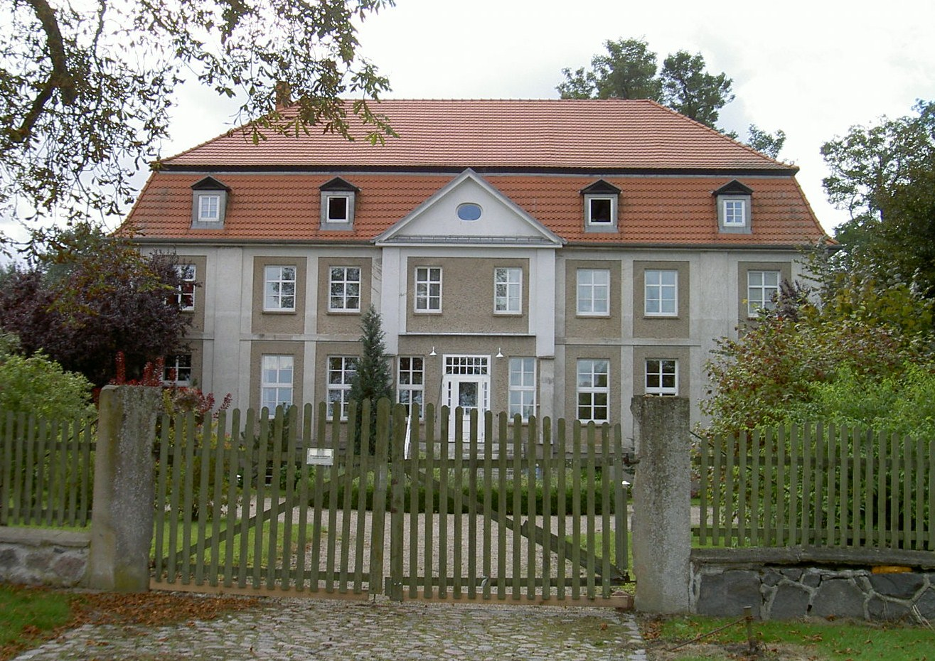 Gutshaus Groß Luckow, Landkreis Uecker-Randow